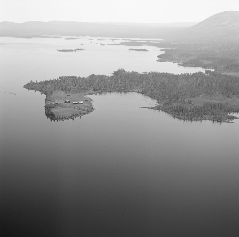 Vuojat. På en udde, som skjuter ut i sjön i vinkel, ligger gården Karatsträsk 1:2. Foto mot SSO. Motiv: Karats Nyckelord: Flygbilder Kategori: Bondgård, Flodlandskap Vuojat. På en udde, som skjuter ut i sjön i vinkel, ligger gården Karatsträsk 1:2. Foto mot SSO.